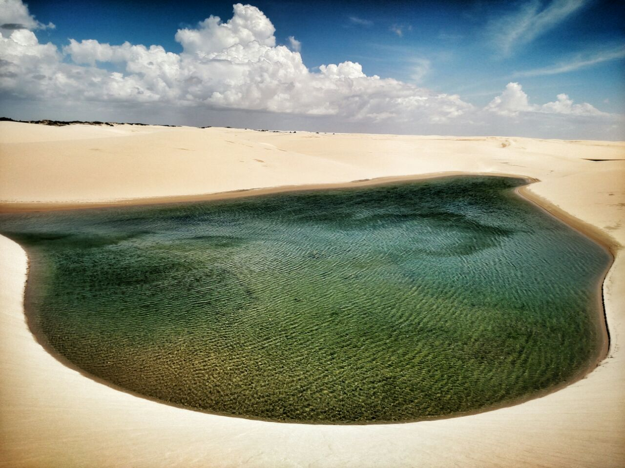 a lagoa verde que brilha os olhos de quem ve